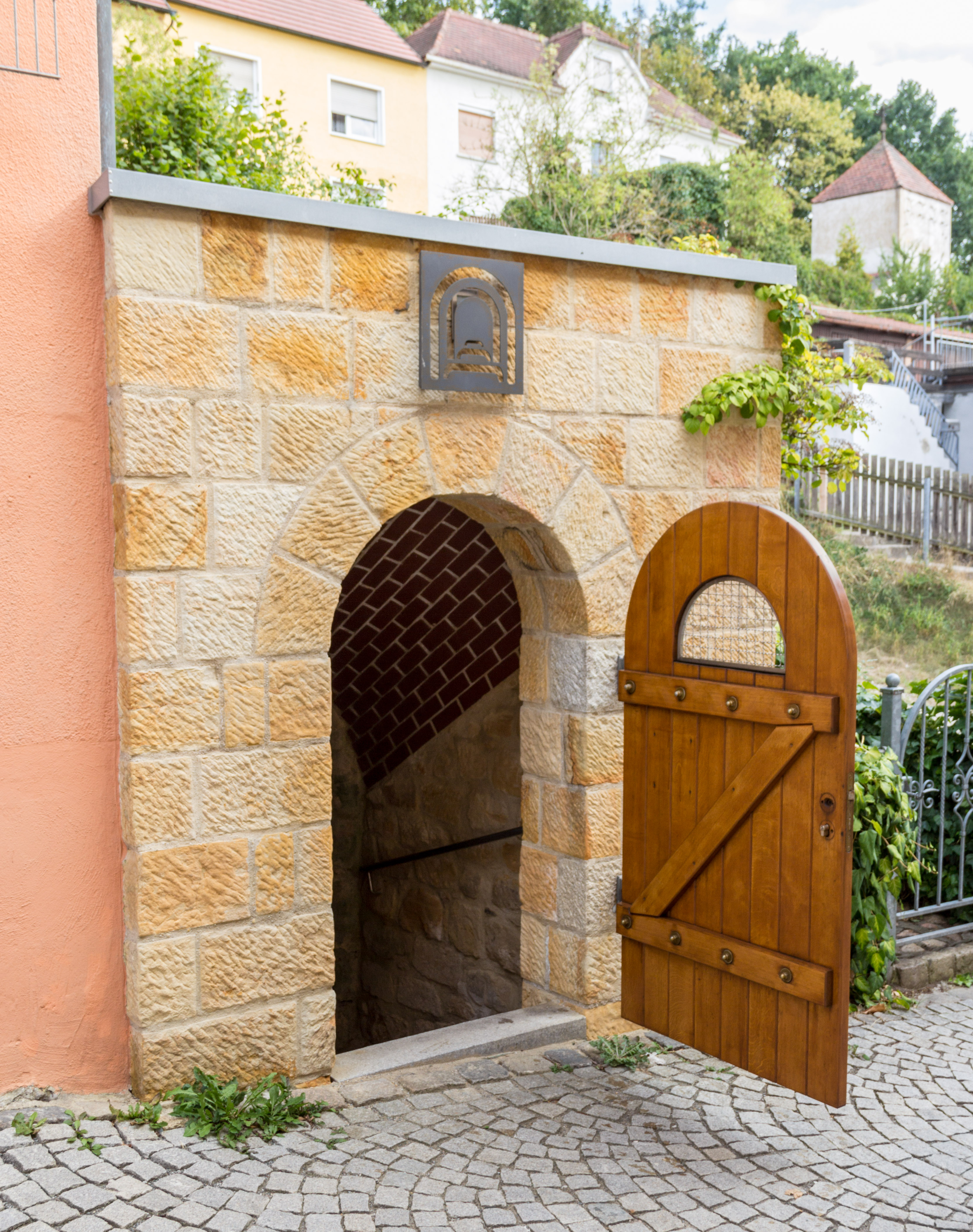 Felsenkeller, Schwandorf, Baudenkmal, Geotop